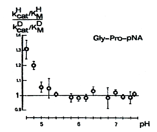 Chemismus der Dipeptidylpeptidase 4: Isotopieeffekt in Abhängigkeit vom pH-Wert